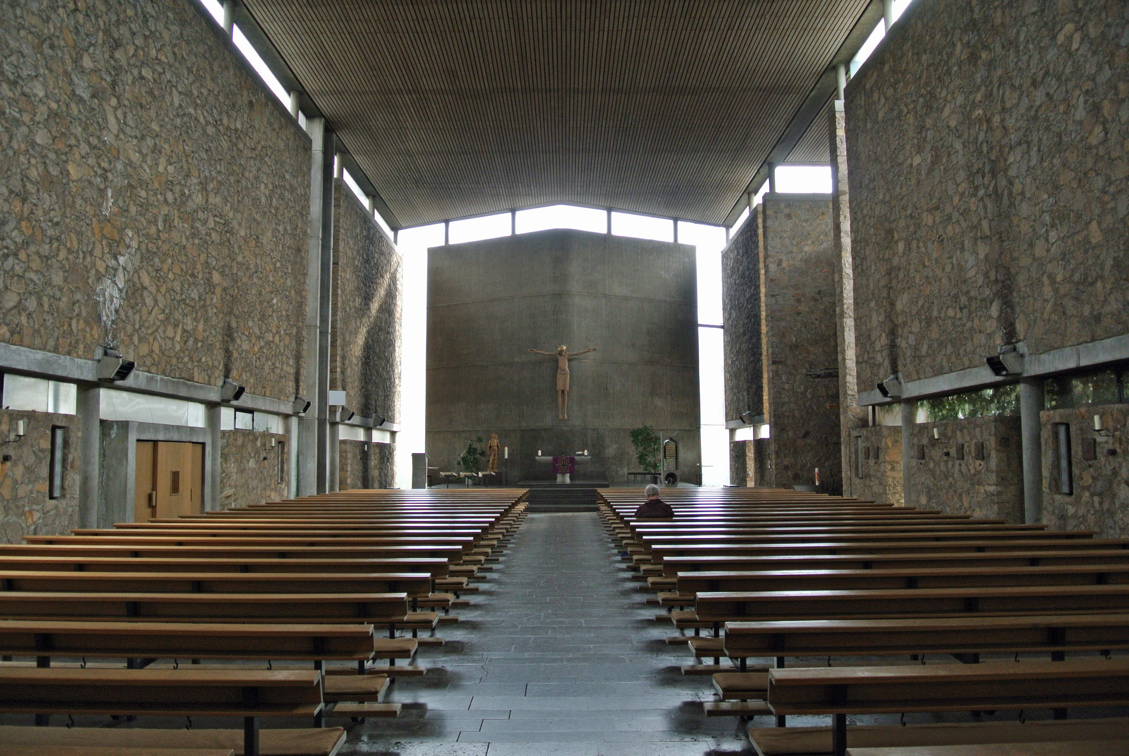 Katholische St. Sebastiankirche in Frankfurt-Nordweststadt, Ernst-Kahn-Straße 47; Bauzeit 1965-1966; Architekt: Johannes Krahn; Baudenkmal; Innenraum